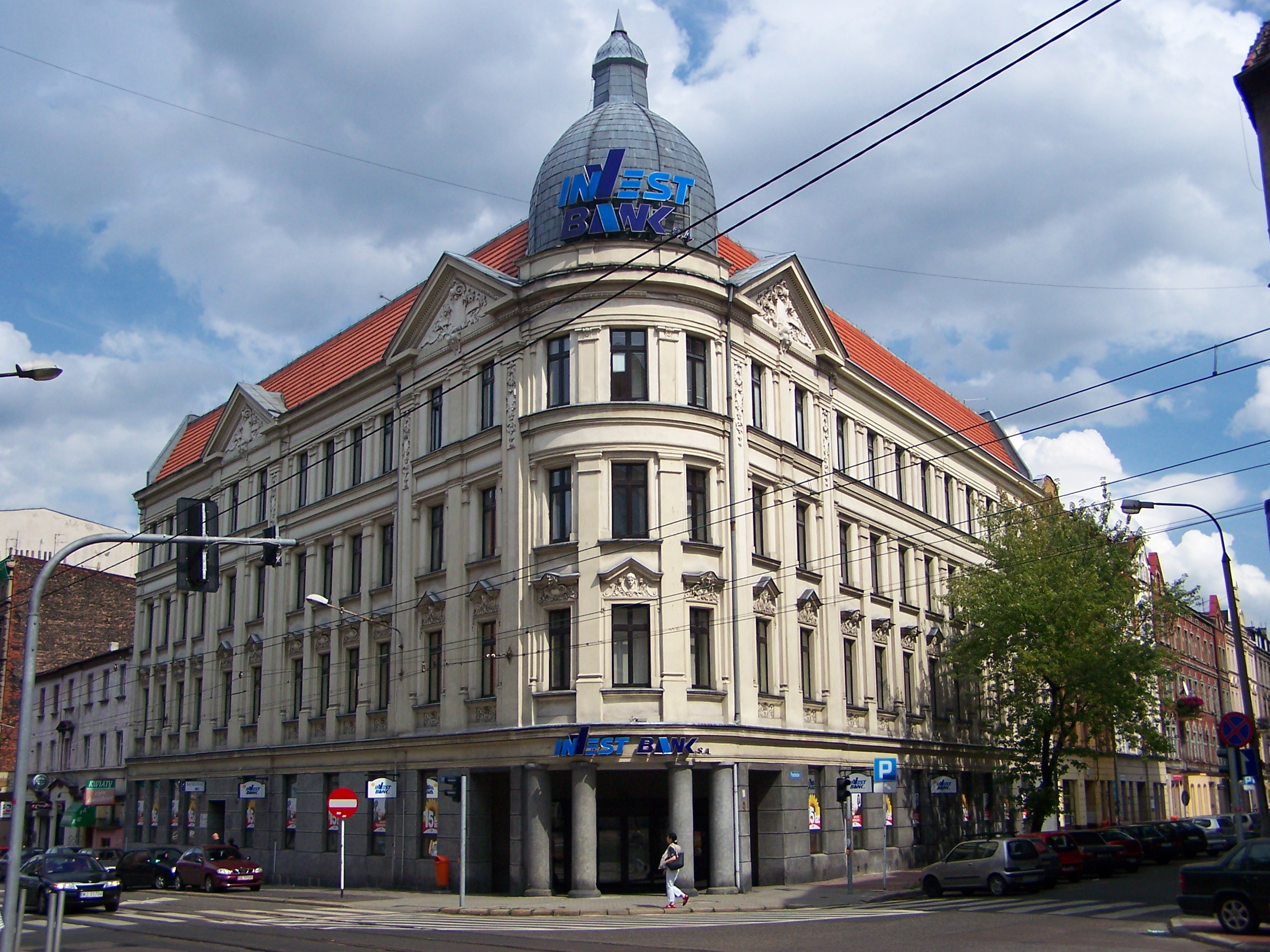 Kamienica na rogu ulic Kościuszki i Powstańców (obecnie siedziba Invest Banku) w Katowicach.